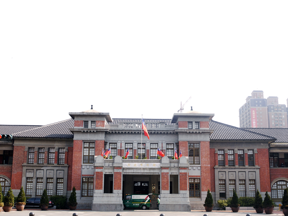 新竹州廳，今新竹市政府